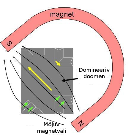 Joonis ferromagneetilise materjali doomenite magnetiseerimisest.